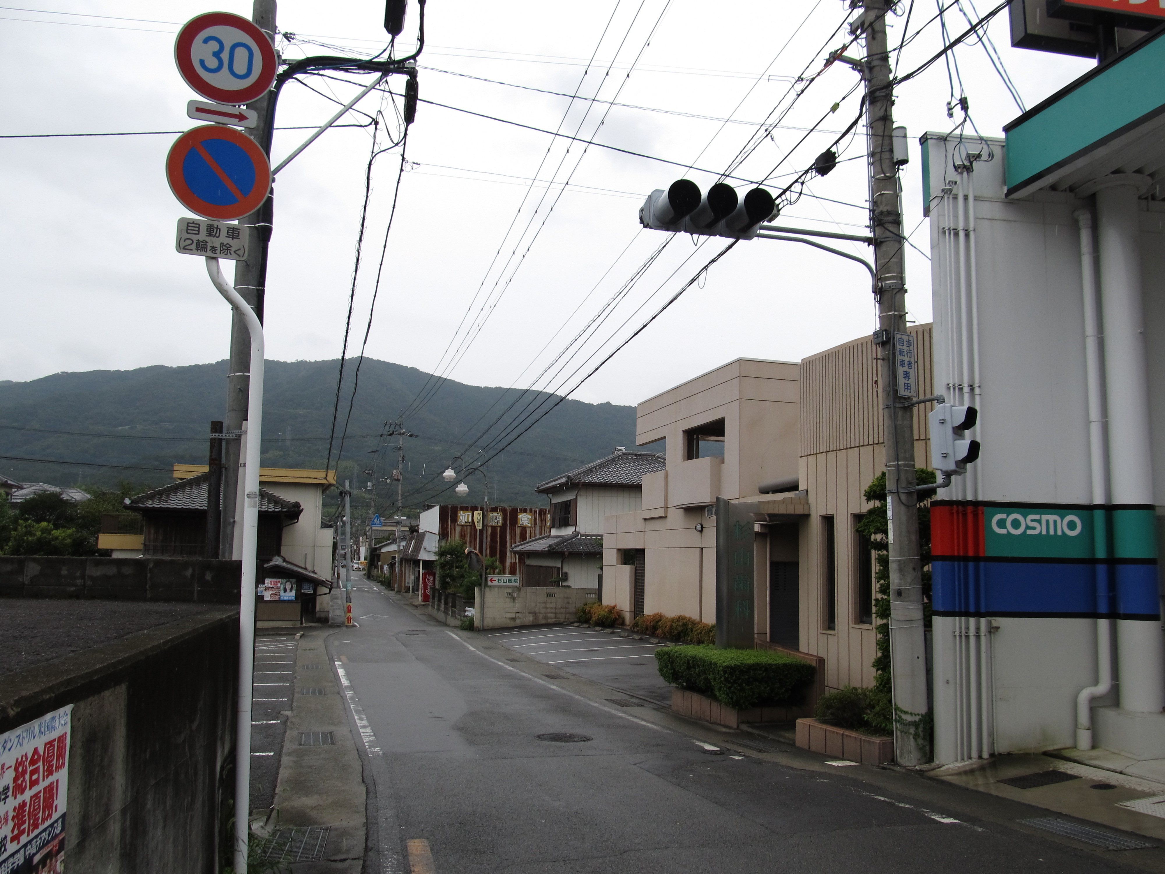 徳島県道156号阿波川島停車場線の終点（吉野川市川島町、国道192号城山交差点）から南方向を見て撮影。